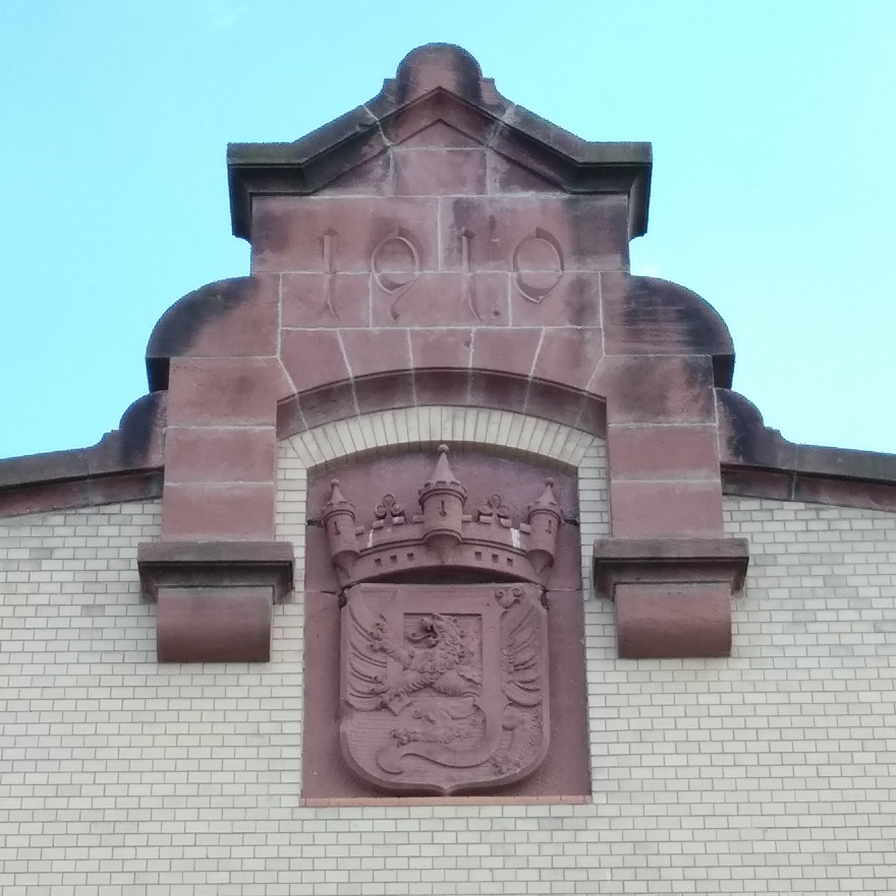 Portal des Alten Schlachthofs in Gießen mit Wappen der Stadt und Jahreszahl 1910